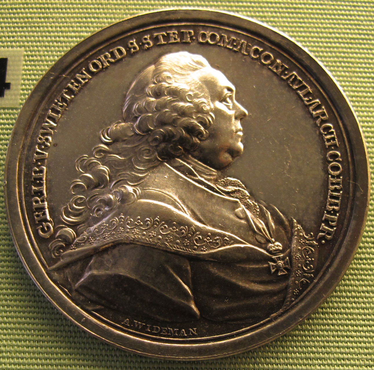 Gerhard von Swieten, 1772